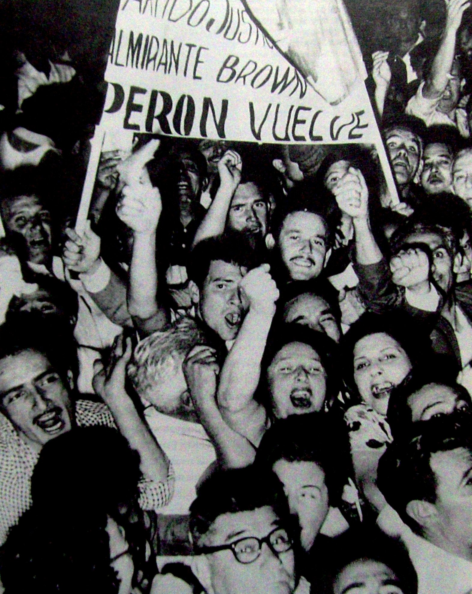 Es una foto de una manifestación peronista durante las elecciones de diputados y senadores de marzo de 1962.